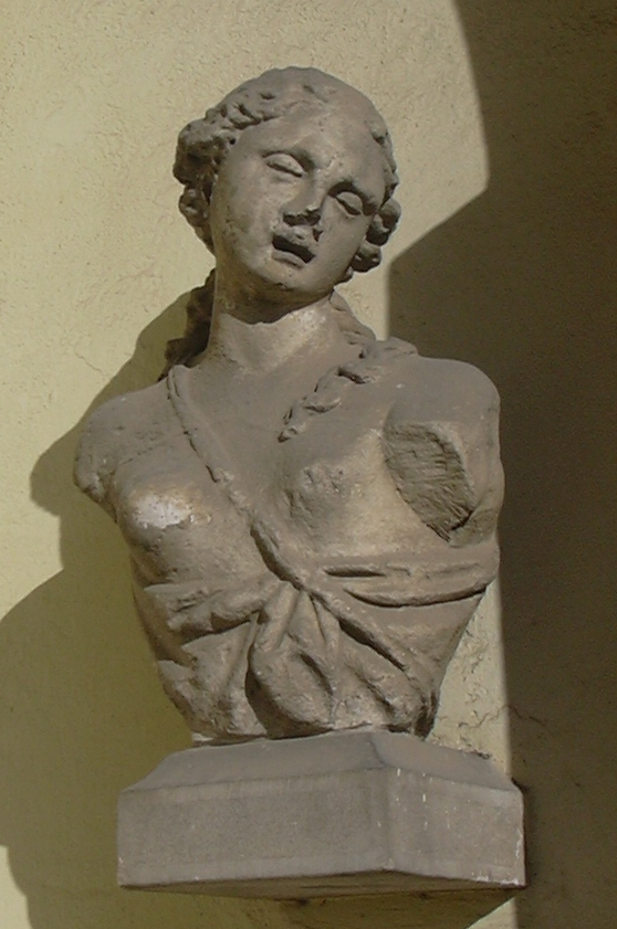 Diana_bohyně_lovu_z_Račického_zámku dnes na zámku Vyškov (Vyškov- czech republic)